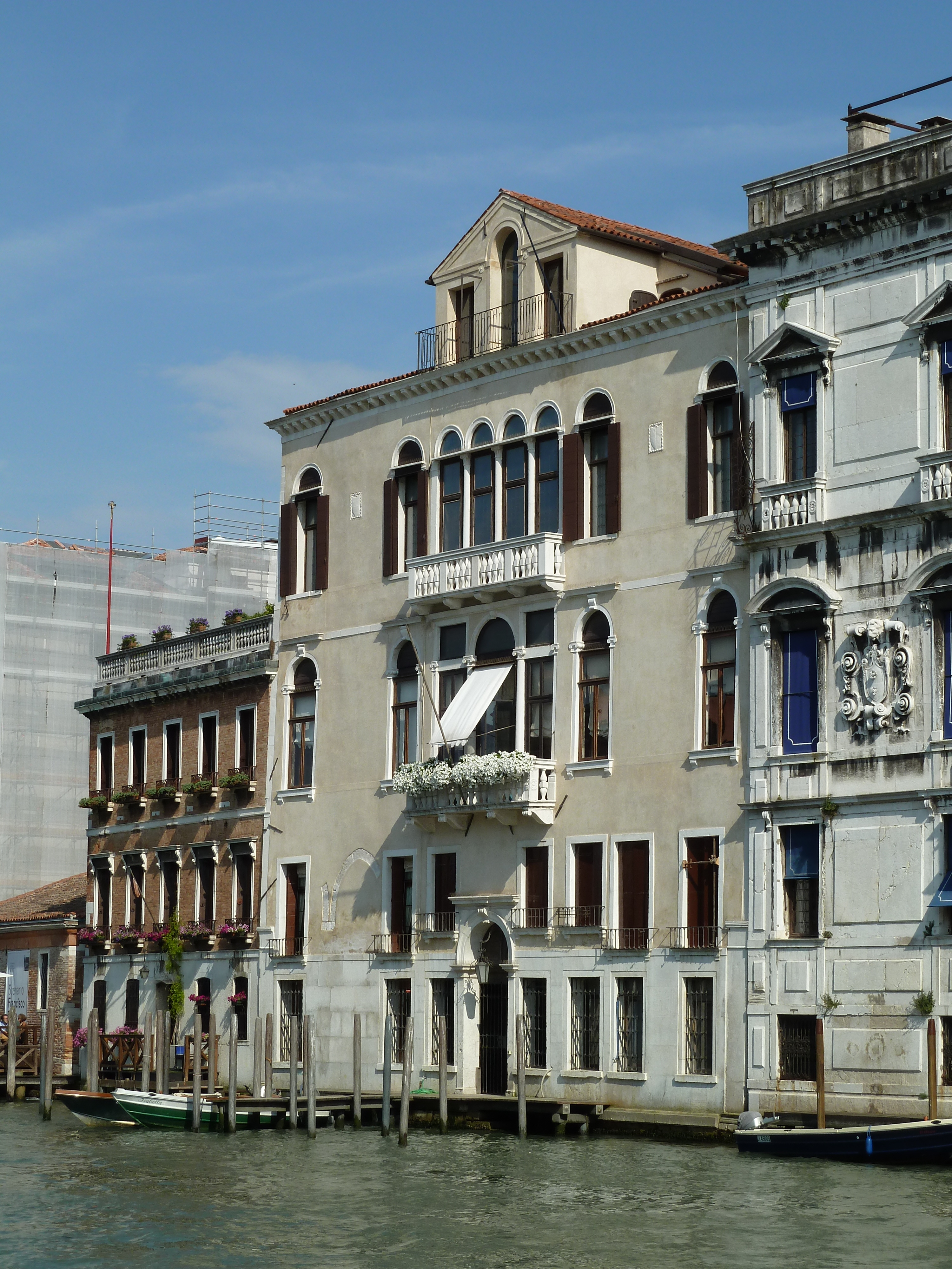 Corner Gheltoff